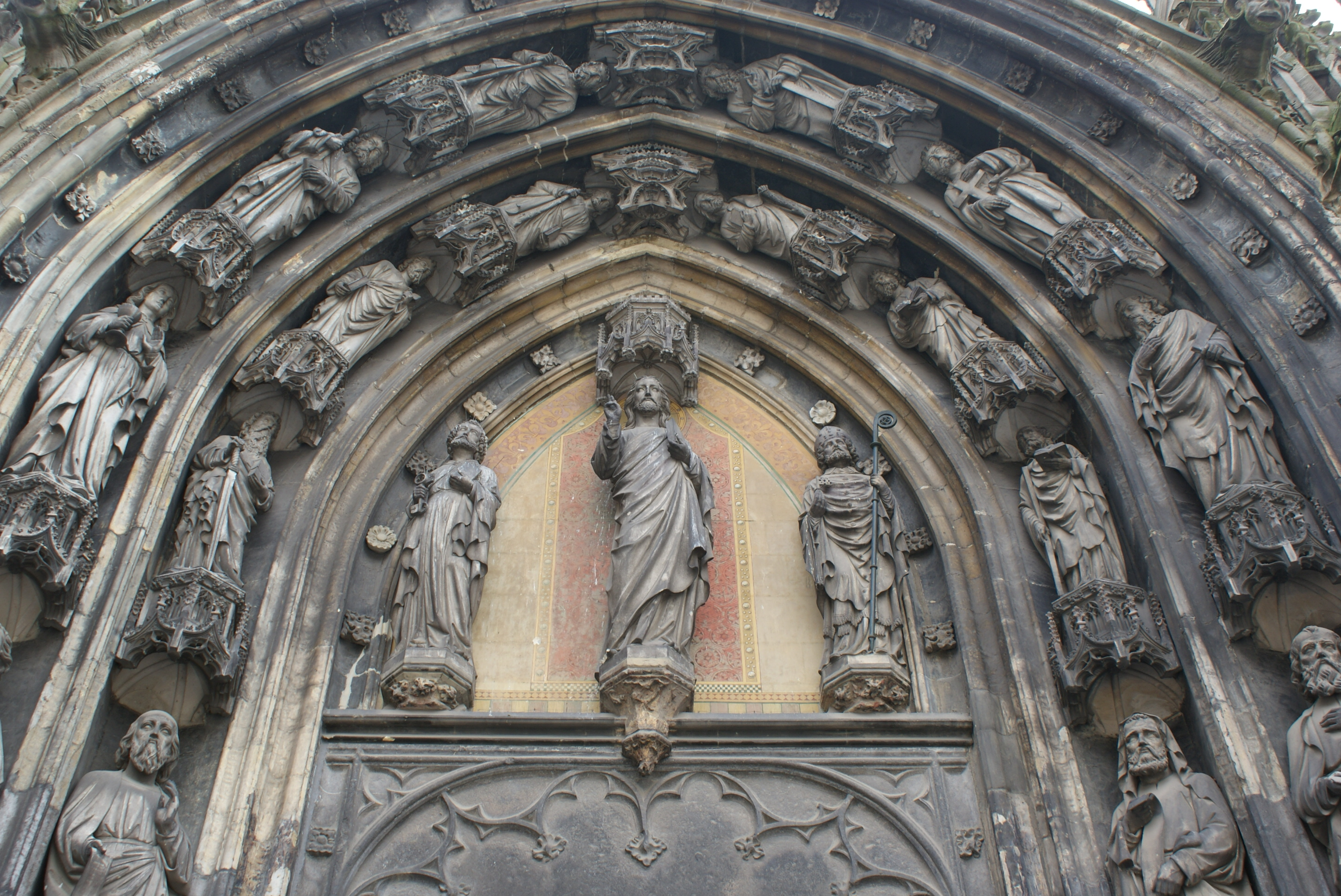 Timpaan boven de ingang aan het Keizer Karelplein. Het in hardsteen uitgevoerde noordportaal aan het Keizer Karelplein is eind 19e eeuw, onder leiding van J.Th.J. Cuypers en J.H.J. Kayser gereconstrueerd en weer van rijk beeldhouwwerk voorzien.